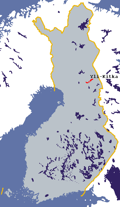 Yli-Kitkan sijainti Suomessa * Sjöns Yli-Kitka läge i Finland * Location of lake Yli-Kitka in Finland